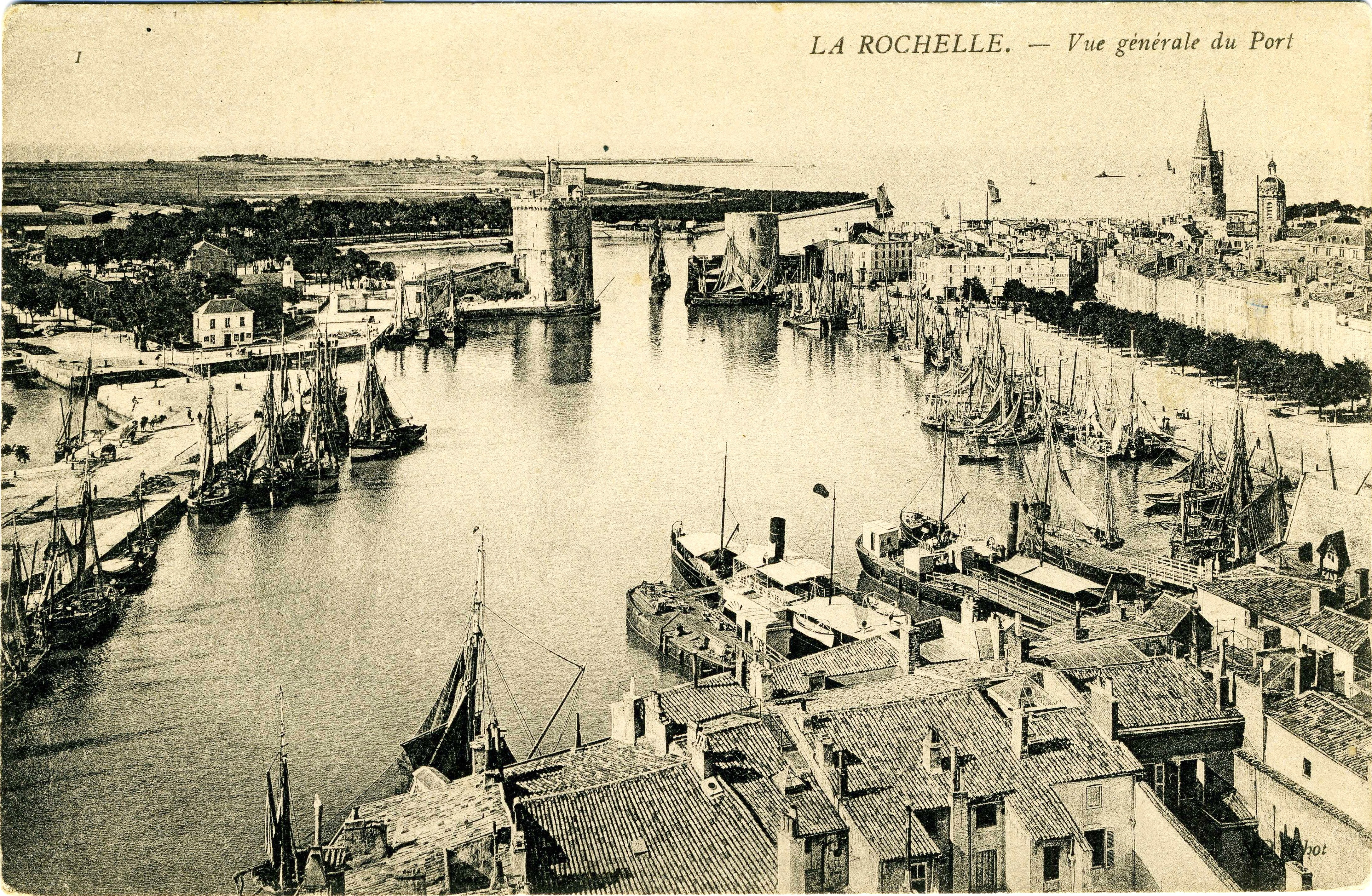 Vue générale du port de La Rochelle (France). Carte postale ancienne de date inconnue, expédiée de La Rochelle à destination de Paris le 14 août 1906.